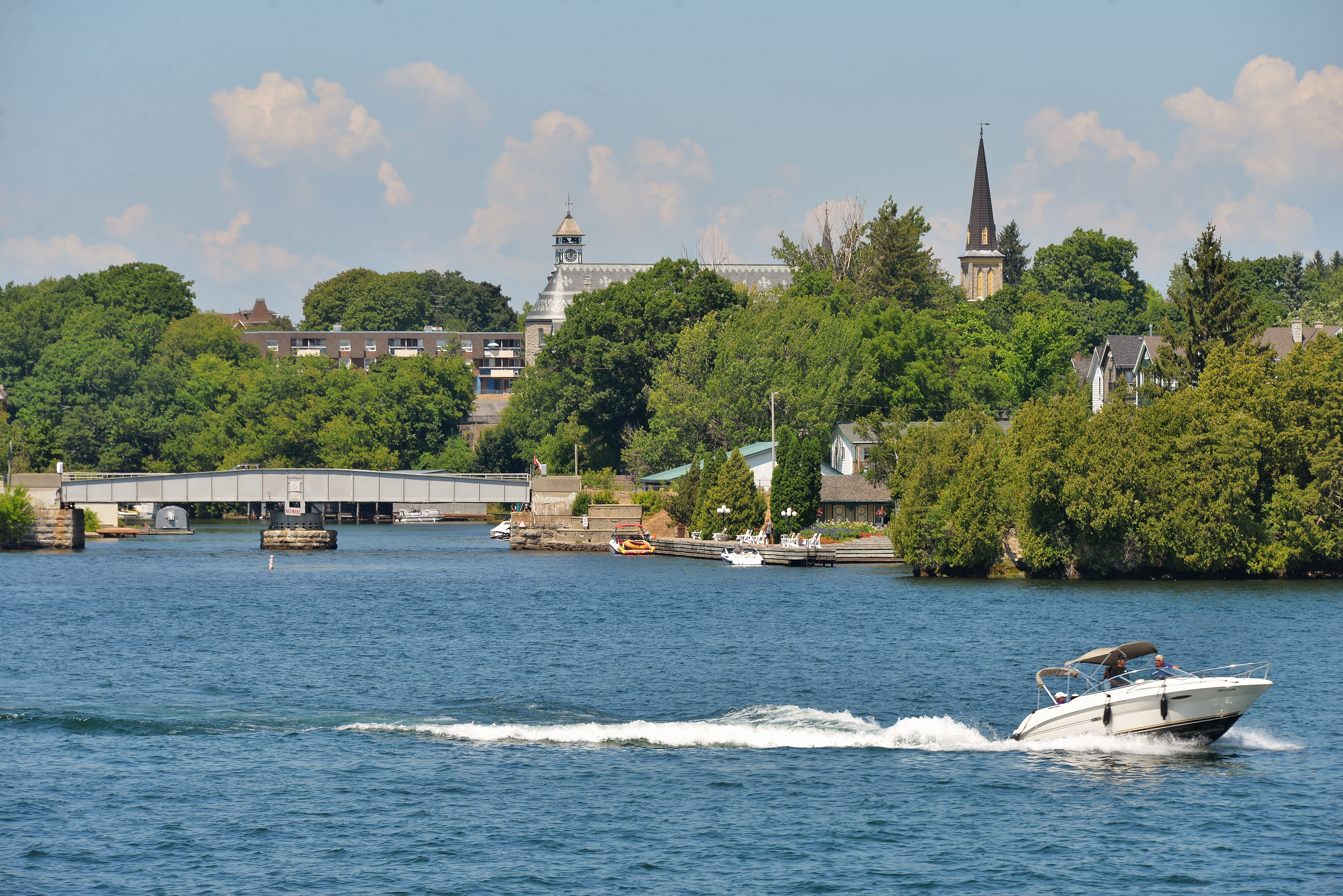 Обертовий міст (зліва) на фоні споруд центральної частини Ґананокве